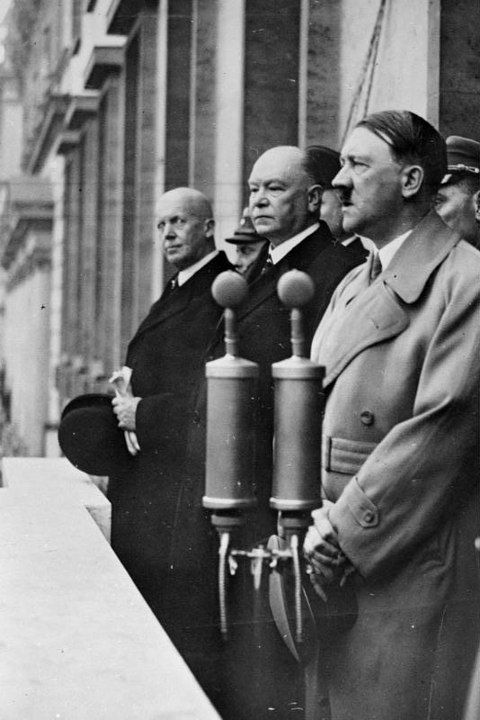 Berlin, H.H. Lammers, J. Dorpmüller, A. Hitler Zentralbild. Die deutsche Reichsbahn wurde 1919 auf Grund des Versailler-Friedensvertrages mit 11 Milliarden Goldmark Obligationen zur Sicherstellung der Reparationen belastet und unter alliierte Aufsicht gestellt. Unter Hitler wurde die Reichsbahn wieder unter ausschließlich deutsche Verwaltung gestellt. UBz: Adolf Hitler spricht aus diesem Anlass am 4.2.1937 vom Balkon der Reichskanzlei zu 15.000 Eisenbahnern. Vlnr: Staatssekretär Hans-Heinrich Lammers, Reichsverkehrsminister Dr. Julius Dorpmüller und Reichskanzler Adolf Hitler. 1619-37 [Berlin.- Dr. Hans Heinrich Lammers, Dr. Julius Dorpmüller, Adolf Hitler] Abgebildete Personen: Dorpmüller, Julius Heinrich Dr.: Reichsverkehrsminister, Generaldirektor der Reichsbahn, Deutschland Hitler, Adolf: Reichskanzler, Deutschland Lammers, Hans-Heinrich Dr.: Reichsminister, Chef der Reichskanzlei, Deutschland